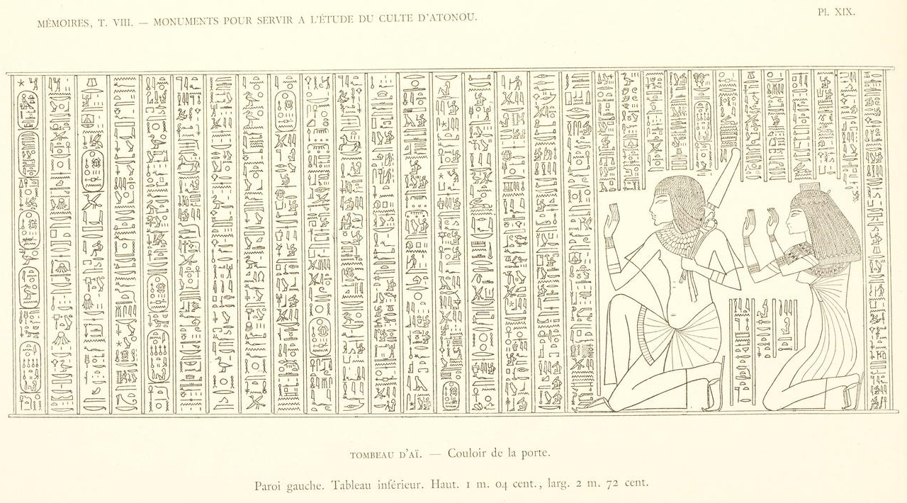 Grab in Amarna. Eje und seine Frau Tij beim Gebet. Gang von der Tür, linke Wand. Kleineres Bild. Breite 2,72 m, Höhe 1,04 m. Beschreibung in franz.: Tombeau d’Ai – Couloir de la porte, Parois gauche. Tableau inférieur.